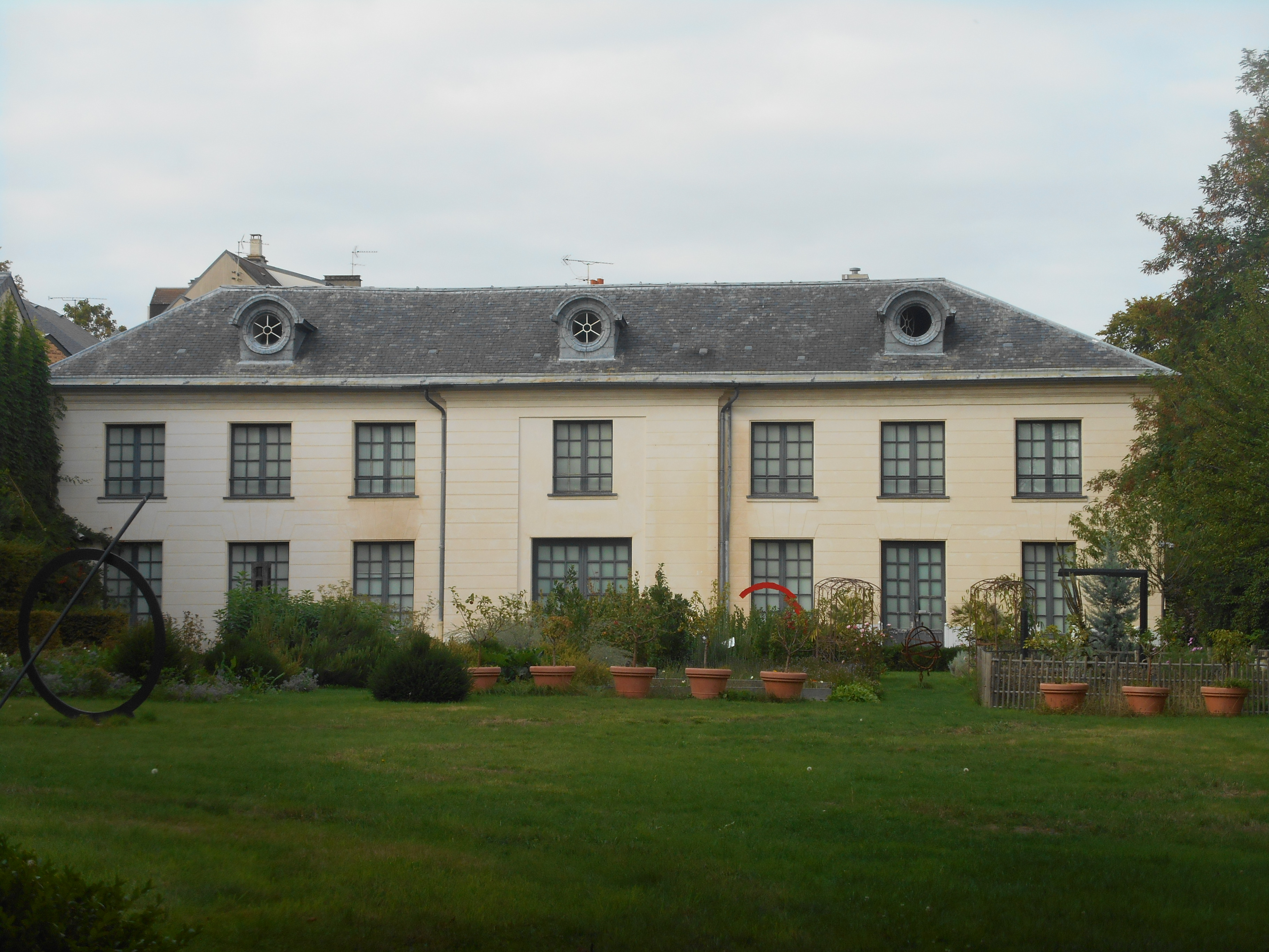 orangerie domaine de madame Elisabeth,Versailles